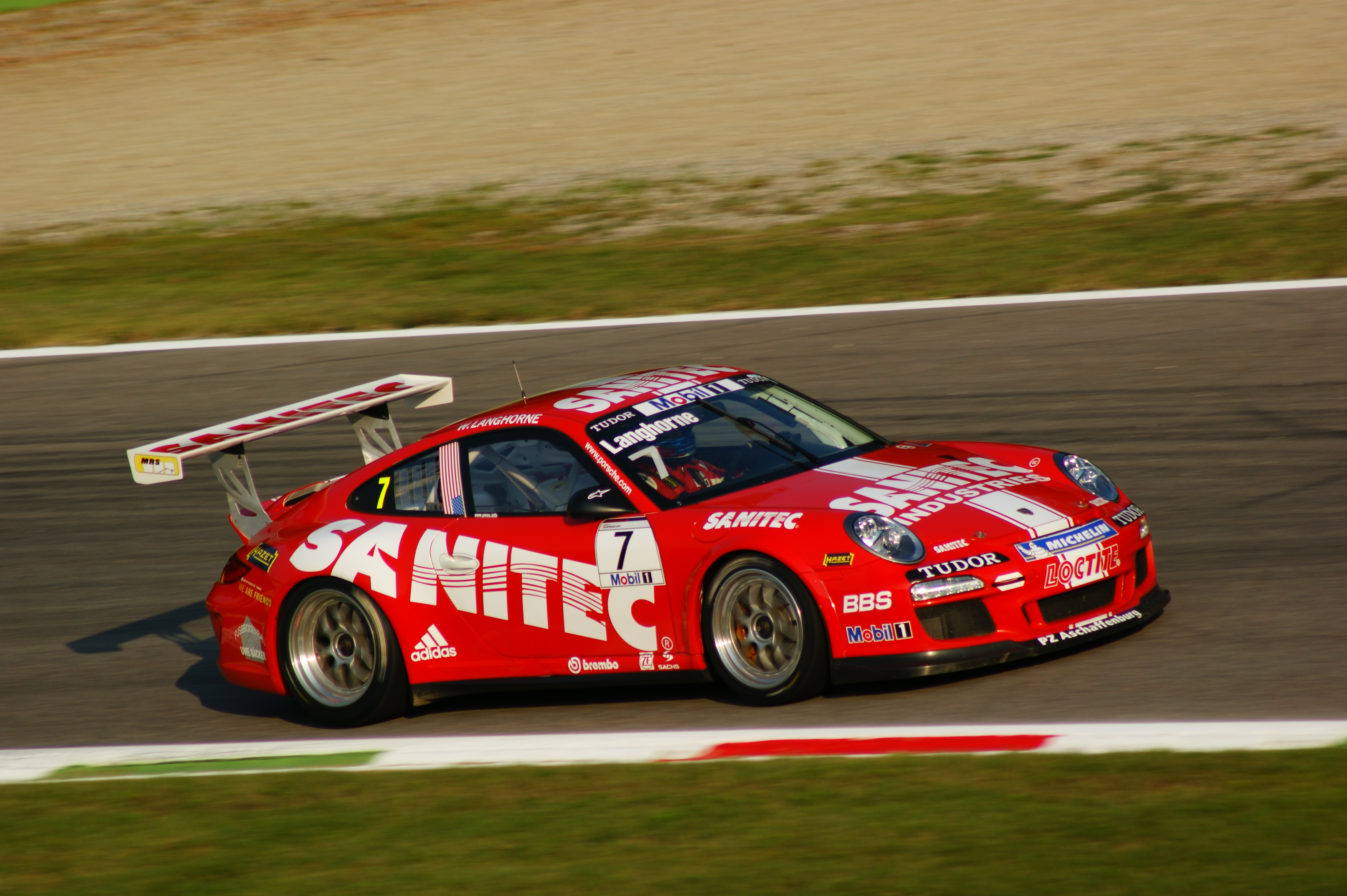 Williams Langhorne alla variante Ascari Monza 2011